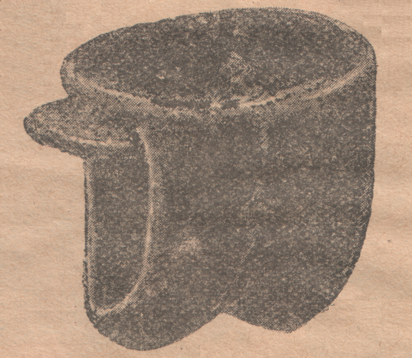 M. Boden, Breslau, Ring 38. Winter 1917/18 (Katalog). Herrenmütze. Elektr. Kanin 75-85 Mark